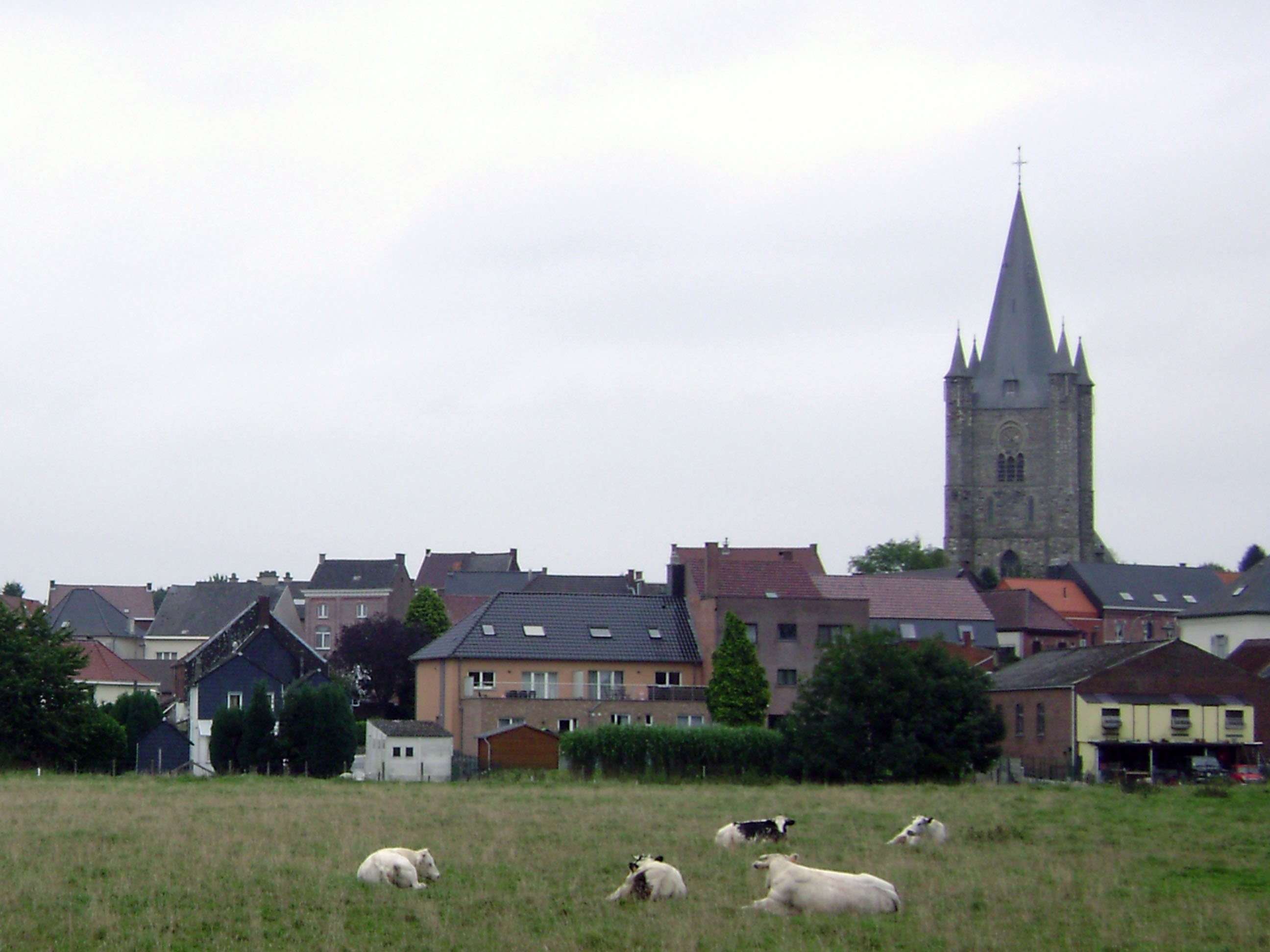 zicht op Herne